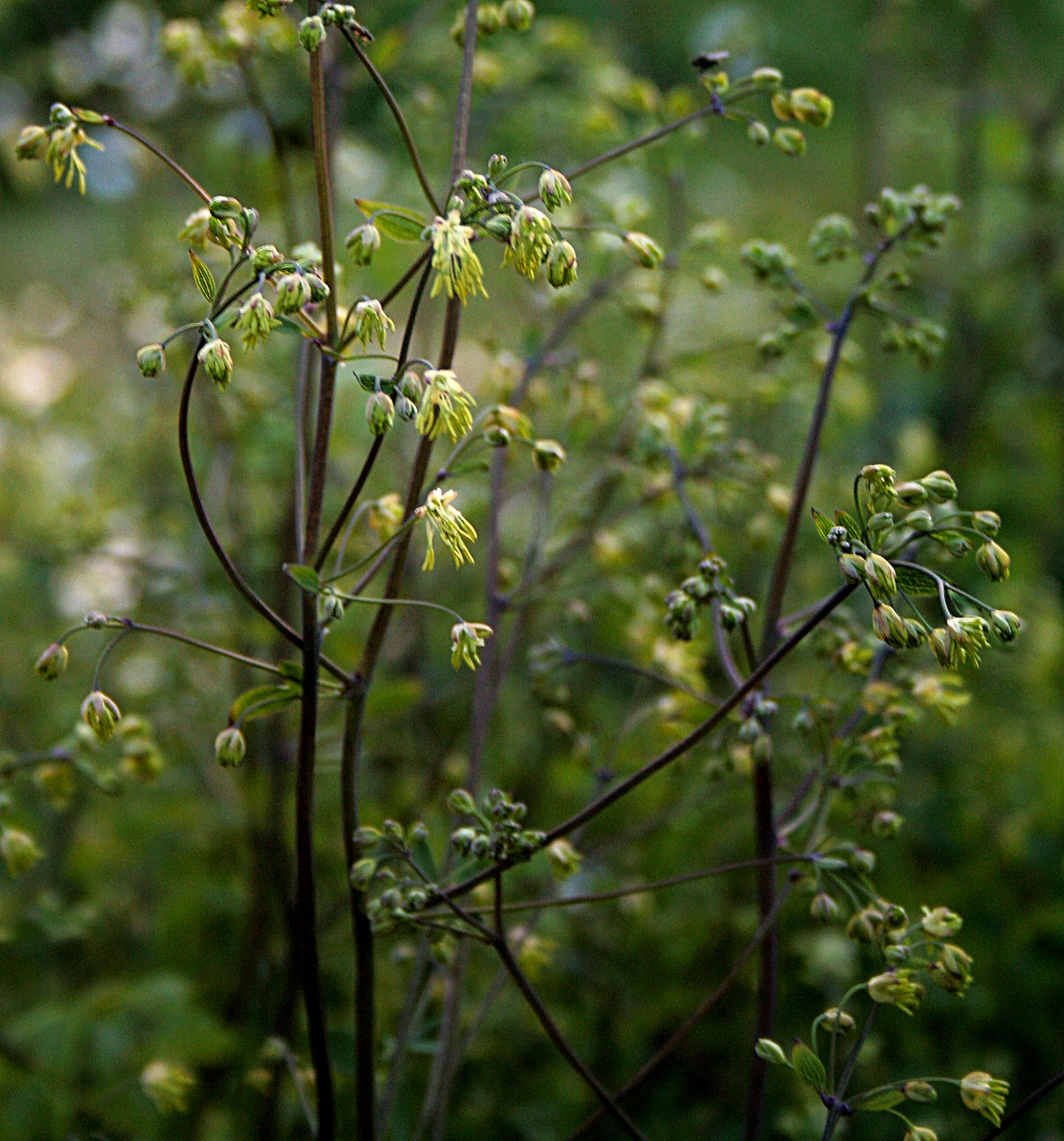 Ísland, Akureyri Botanical Gardens: Kleine_Wiesenraute_(Thalictrum_minus)